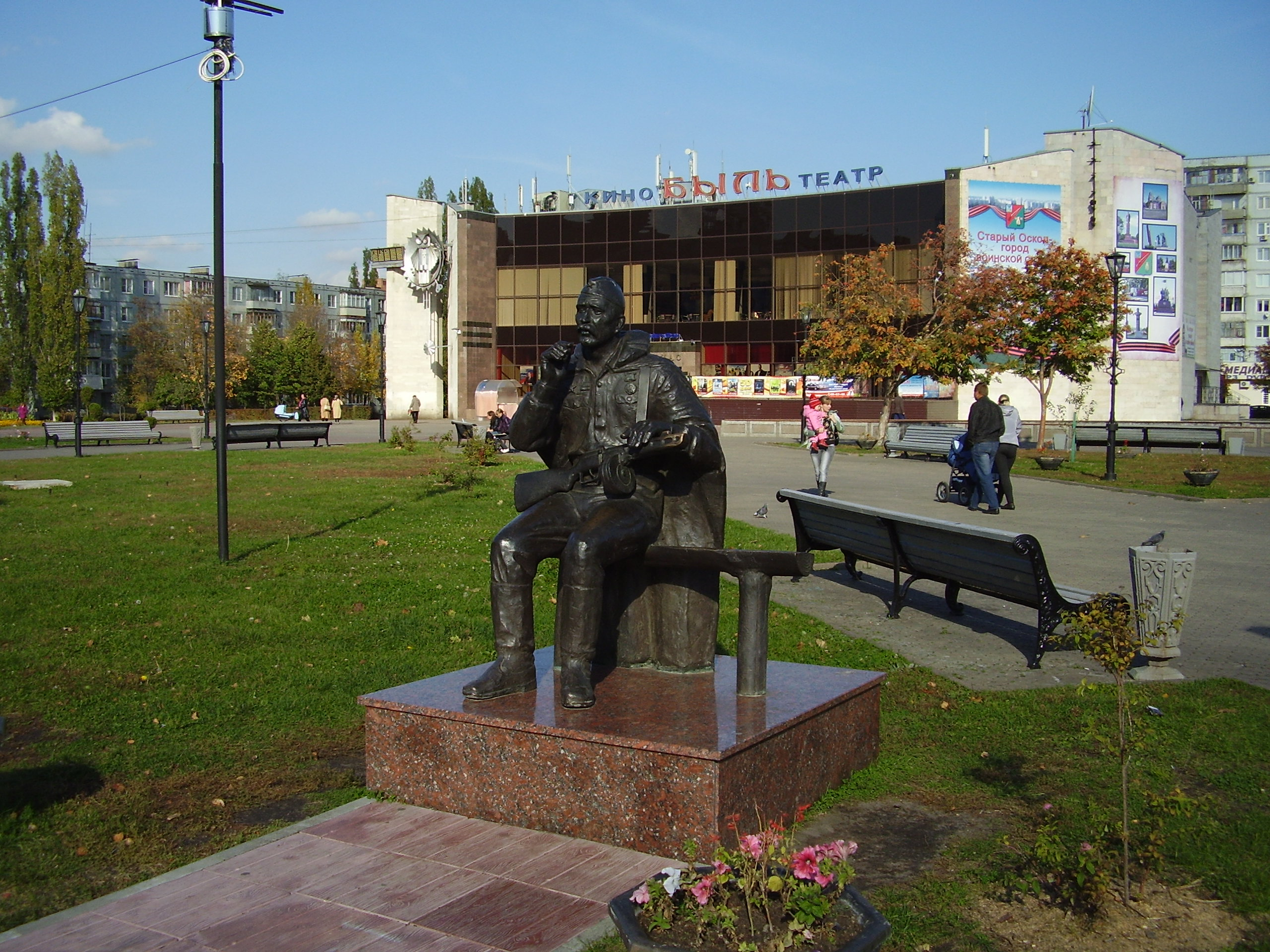 Старый Оскол. "Советский солдат" у к/т "Быль"